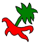 Glifo Náhuatl del municipio de Zimapán, Hidalgo